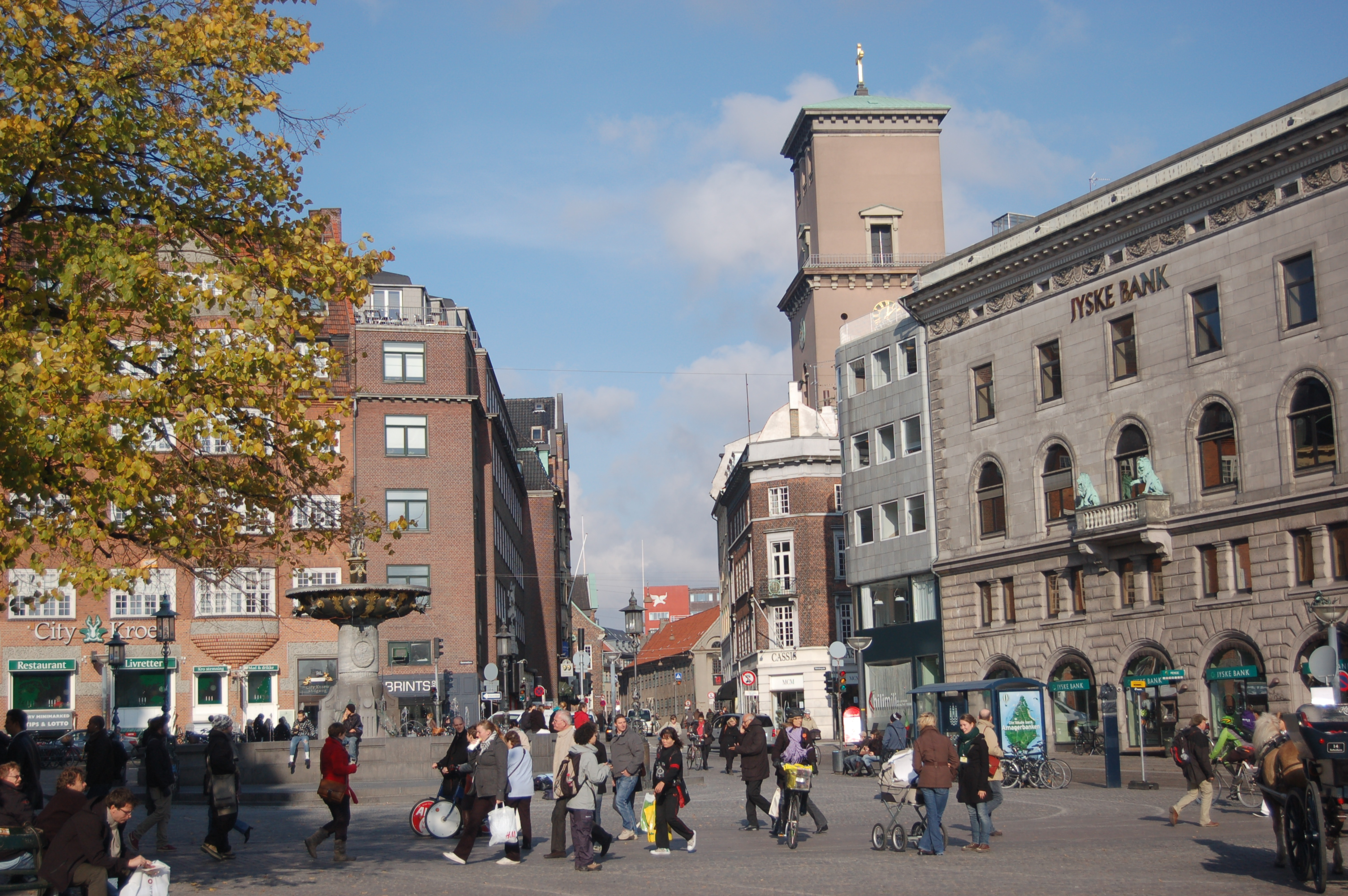 A view up Nørregade from Gammeltorv in central Copenhagen, Denmark